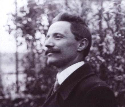 Renato Pampanini (1875-1949)